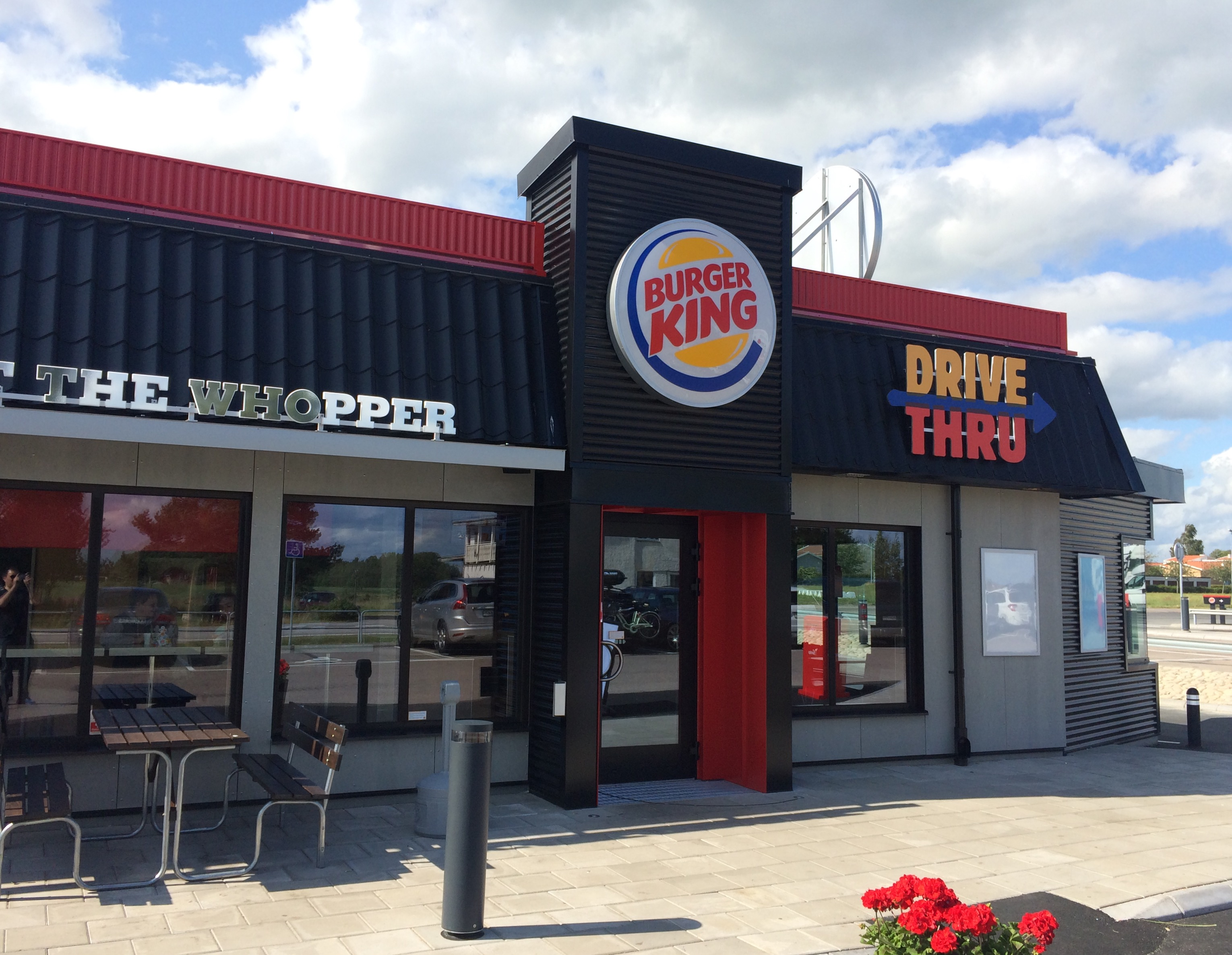 Nyöppnade Burger King-restauranten i Rasta-huset vid E45 i Brålanda, invigd kring midsommar 2015.